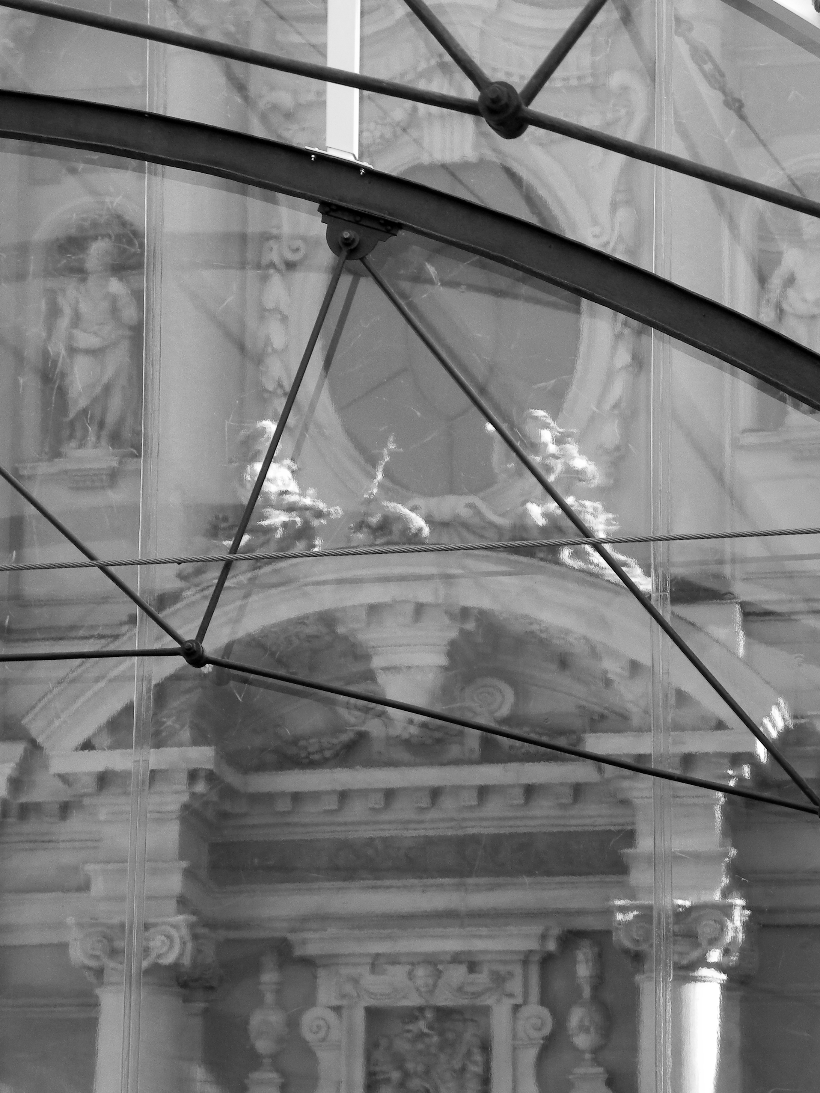 Basilica di San Giovanni Battista This is a photo of a monument which is part of cultural heritage of Italy.